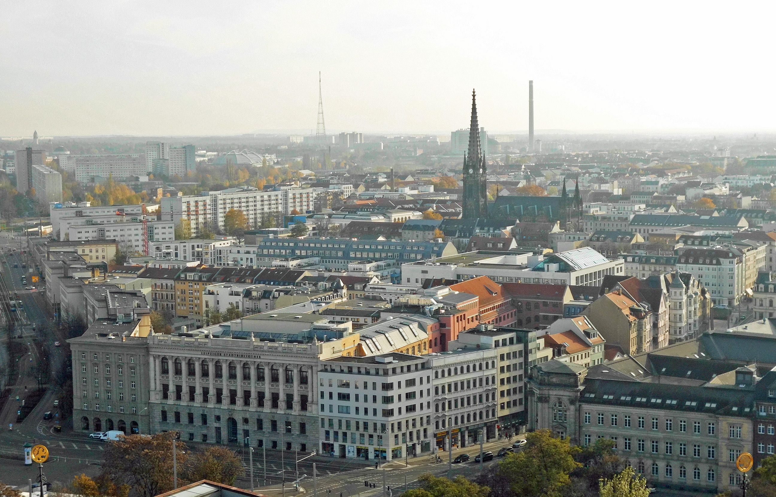 Die innere Südvorstadt Leipzigs vom Turm des Neuen Rathauses